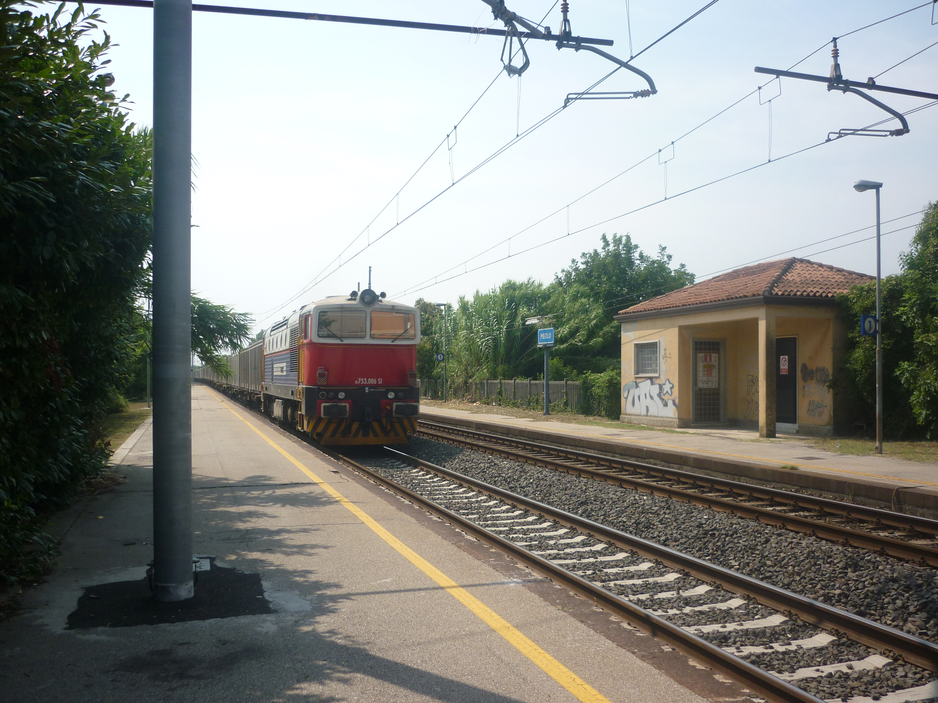 fs